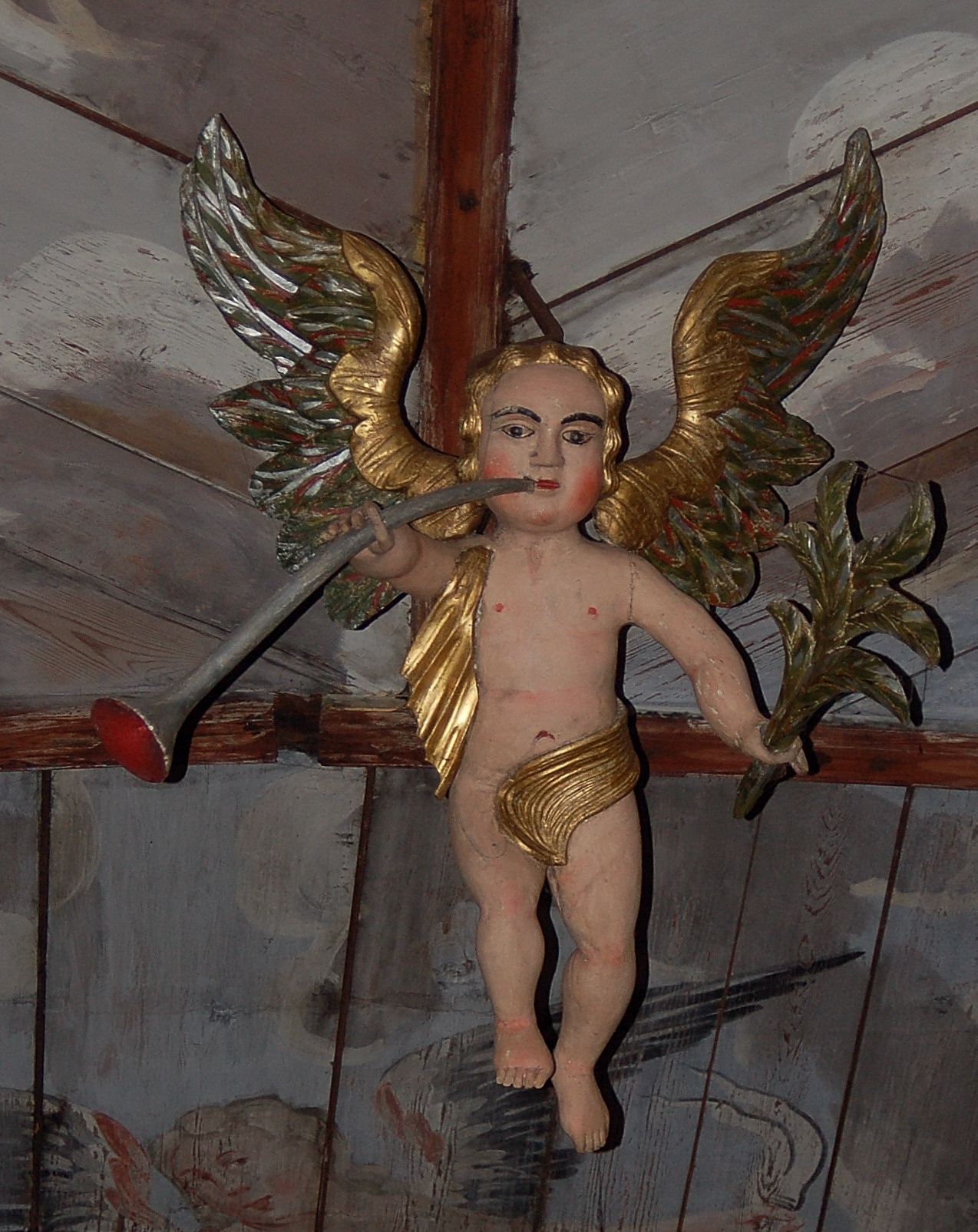 En av fyra putti med basuner och palmblad i händerna hängande i taket i Nysunds kyrka, Åtorp Sweden. De skapades av Isak Schullström 1759.